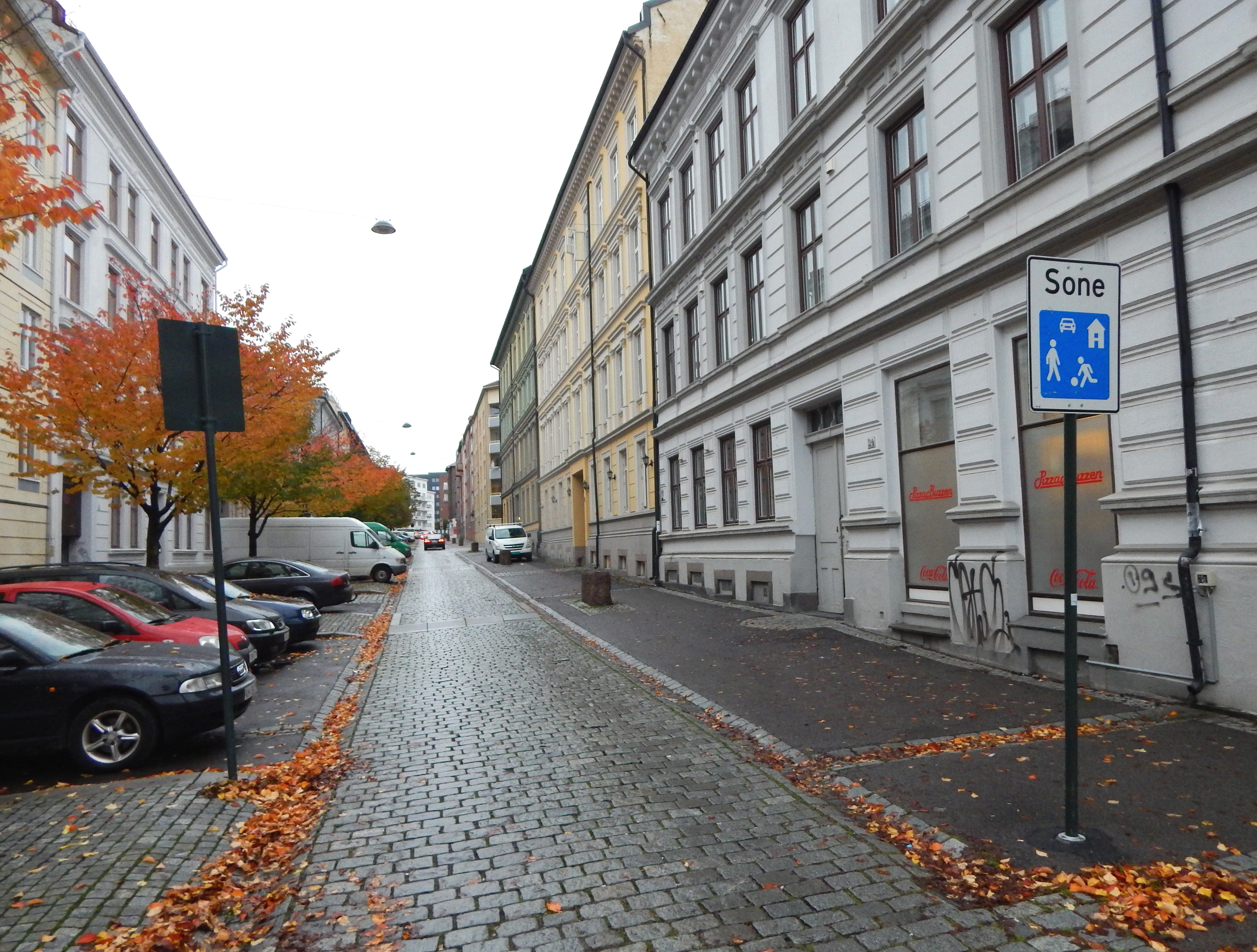 Sigurds gate sett fra Åkebergveien